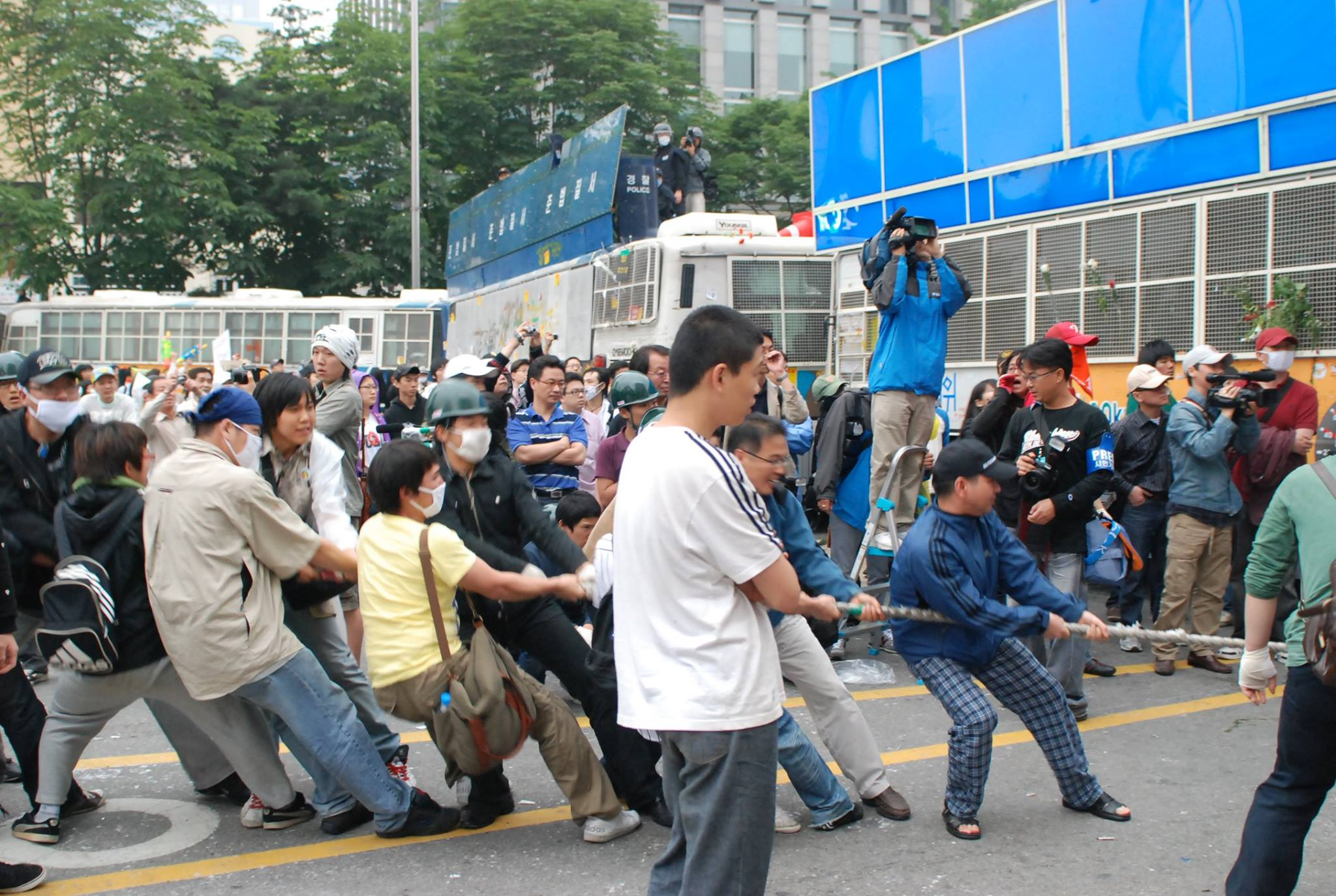 경찰 버스를 밧줄로 당기는 2008년 미국산 소고기 반대 시위대